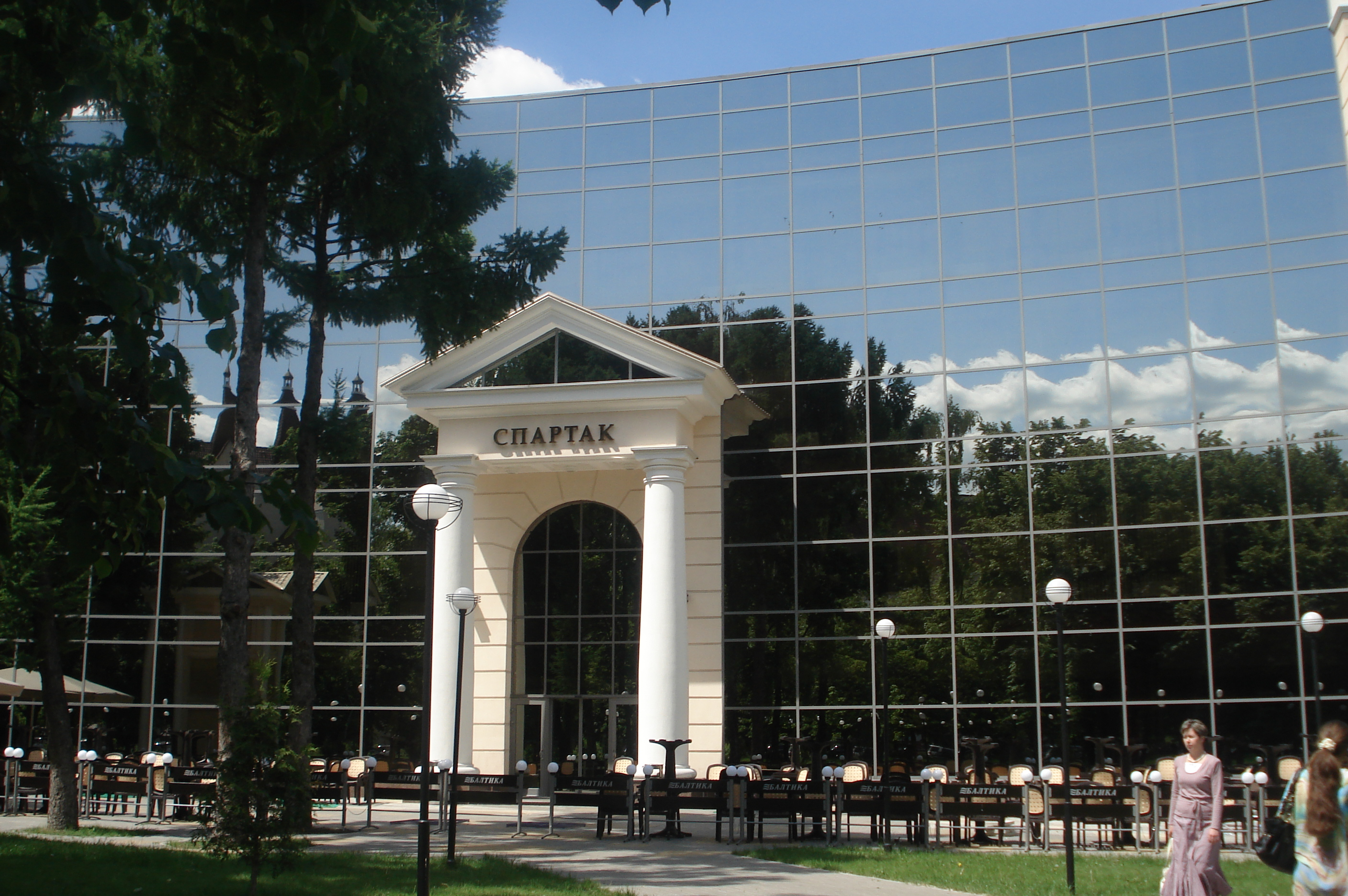 Парк у кинотеатра "Спартак" в Воронеже